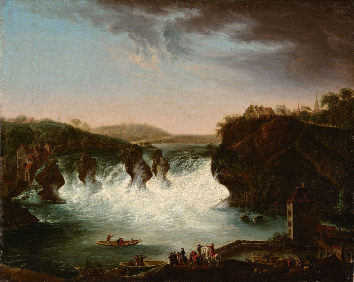 Johann Jakob Schalch (1723–1789): Rheinfall, Kunsthistorisches Museum Wien. Darunter steht: "Cette merveille de la nature est représentée (…) dans le même état où elle étoit lors qu’elle excita l’admiration de l’Empereur Ioseph II. qui s’y rendit pour la voir, le 26 Iuillet 1777 à son passage par la Suisse."